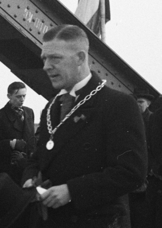 Collectie / Archief : Fotocollectie Anefo Reportage / Serie : [ onbekend ] Beschrijving : Koningin Juliana opent een brug in Doesburg Datum : 26 januari 1952 Locatie : Doesburg, Gelderland Trefwoorden : bruggen, burgemeesters, koningin Persoonsnaam : Juliana, koningin Fotograaf : Noske, J.D. / Anefo Auteursrechthebbende : Nationaal Archief Materiaalsoort : Negatief (zwart/wit) Nummer archiefinventaris : bekijk toegang 2.24.01.03 Bestanddeelnummer : 904-9491